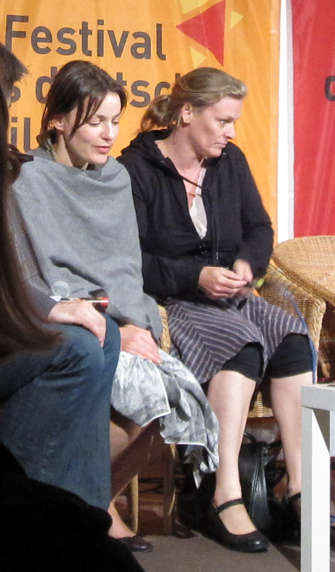 Nicolette Krebitz (links) und die norwegische Regisseurin Anne Hoegh Krohn beim Festival des deutschen Films 2009 während eines Filmgespräches über das deutsche Musical "Liebeslied" im Strandzelt auf der Parkinsel Ludwigshafen